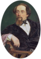 Charles Dickens